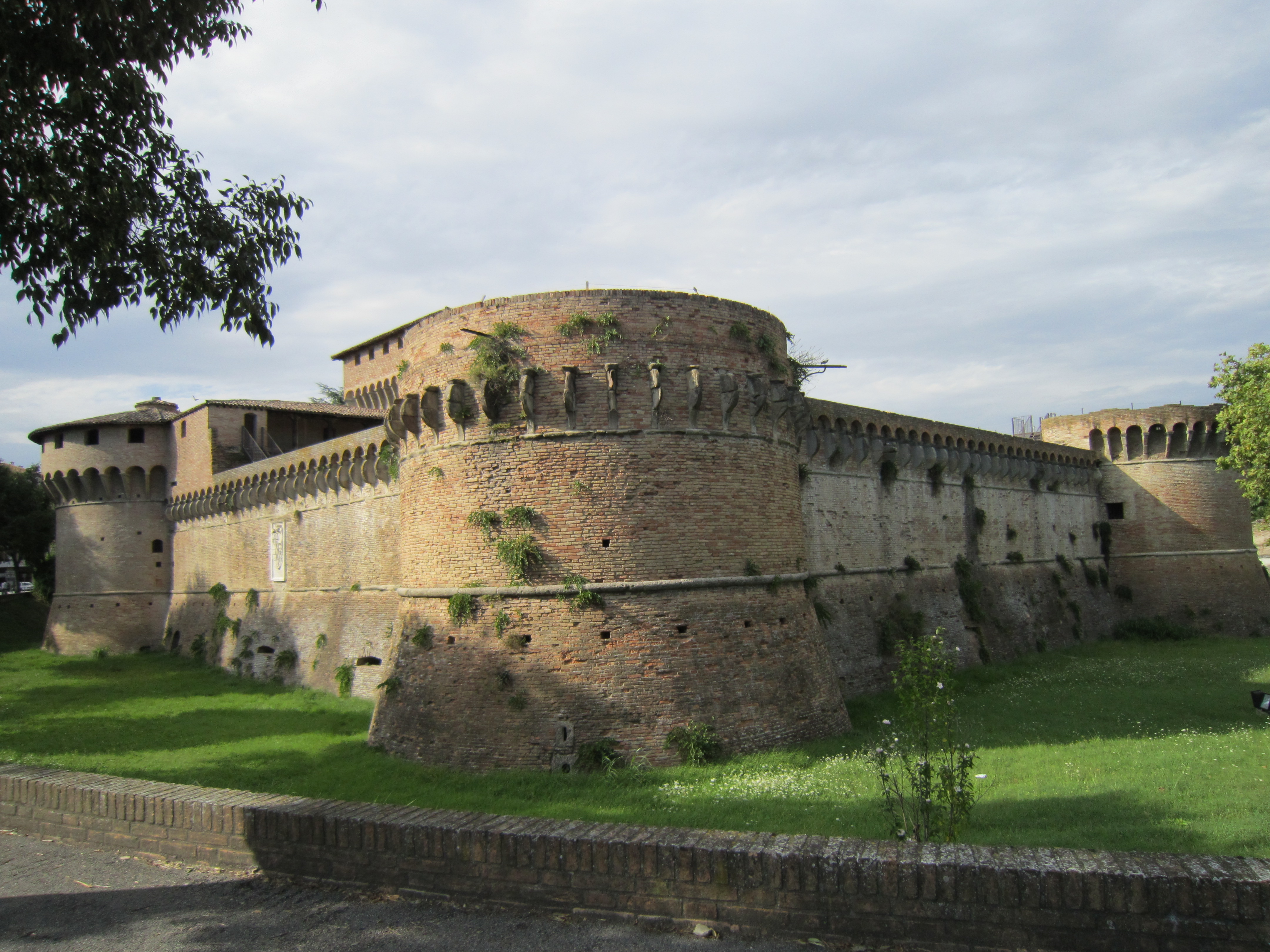 Rocca di Ravaldino, Forlì, foto propria